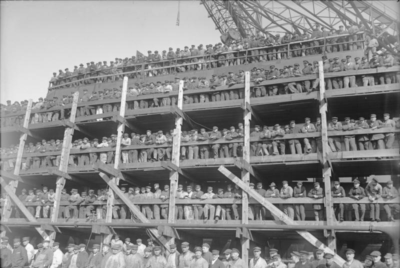 Die feierliche Taufe der 4 neuen deutschen Zerstörer "Tiger", "Lux", "Jagoa" und "Leopard", auf der Staatswerft in Wilhelmshaven! Tausende von Werftarbeitern der staatlichen Werft in Wilhelmshaven schauen von einem Gerüst den Tauffeierlichkeiten der 4 Zerstörer zu.